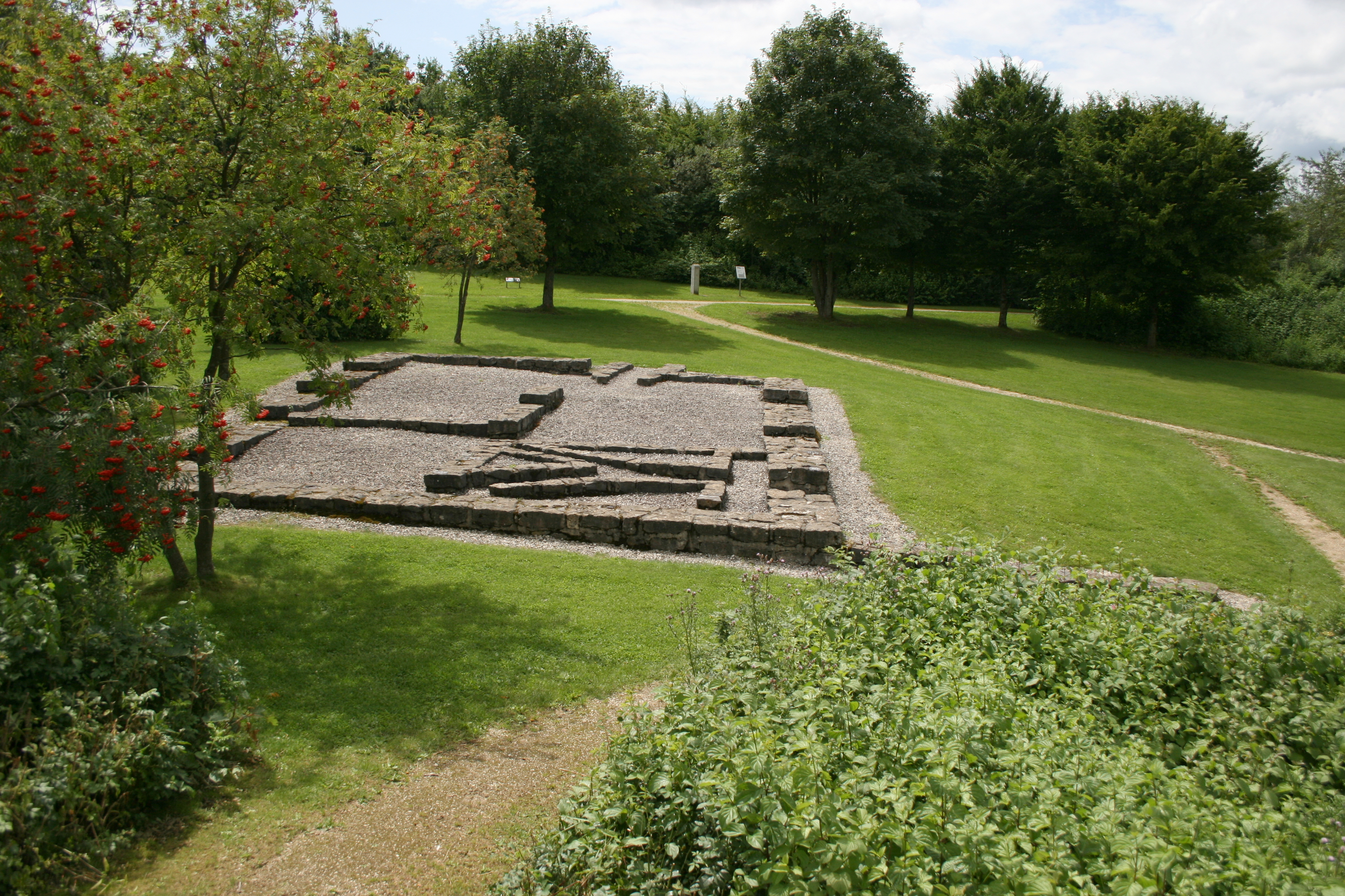 Rekonstruierte Grundmauern eines Vicus-Gebäudes am Kastell Buch. Im vorderen Raum Kanalheizung.